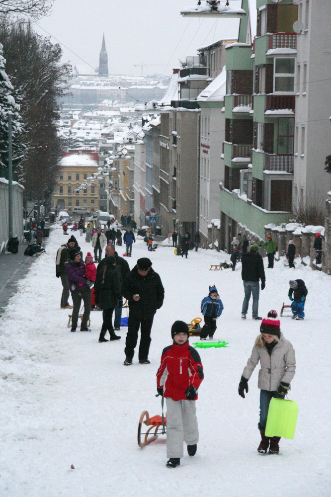 Foto von der Rodelstraße Schwenkgasse, 12.Bez. Wien; Richtung Norden - Im Hintergrund: die Märzkirche